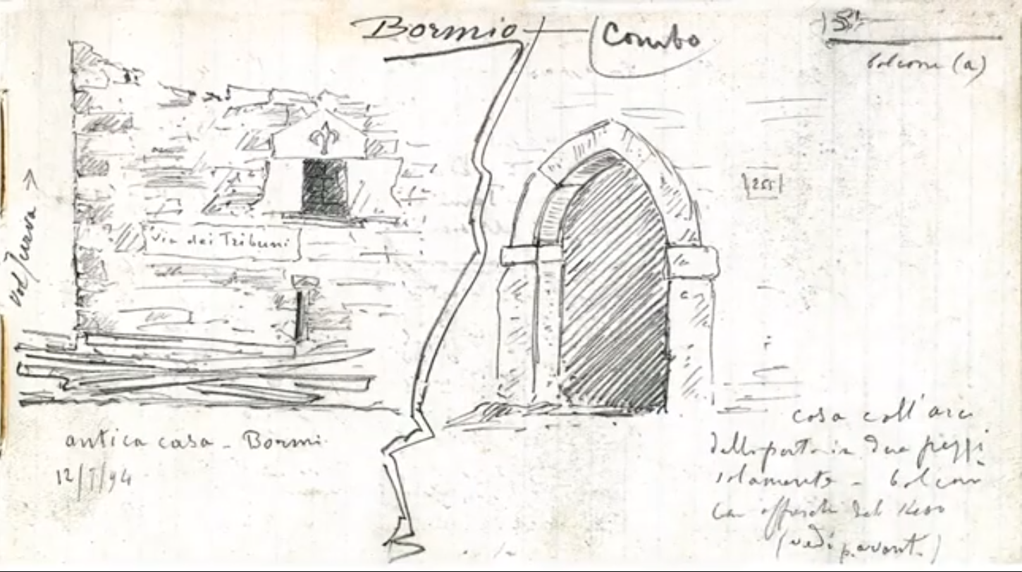 Disegno di Enrico Alberto d'Albertis tratto dai taccuini di viaggio del Capitano Enrico d'Albertis - Cure termali a Bormio 1894. Opera conservata dal Museo delle Culture del Mondo di Castello D’Albertis di Genova.